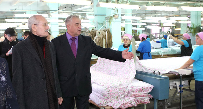 Рустэм Закиевич Хамитов и Анатолий Захарович Саушин в цеху Ишимбайской фабрики трикотажных изделий